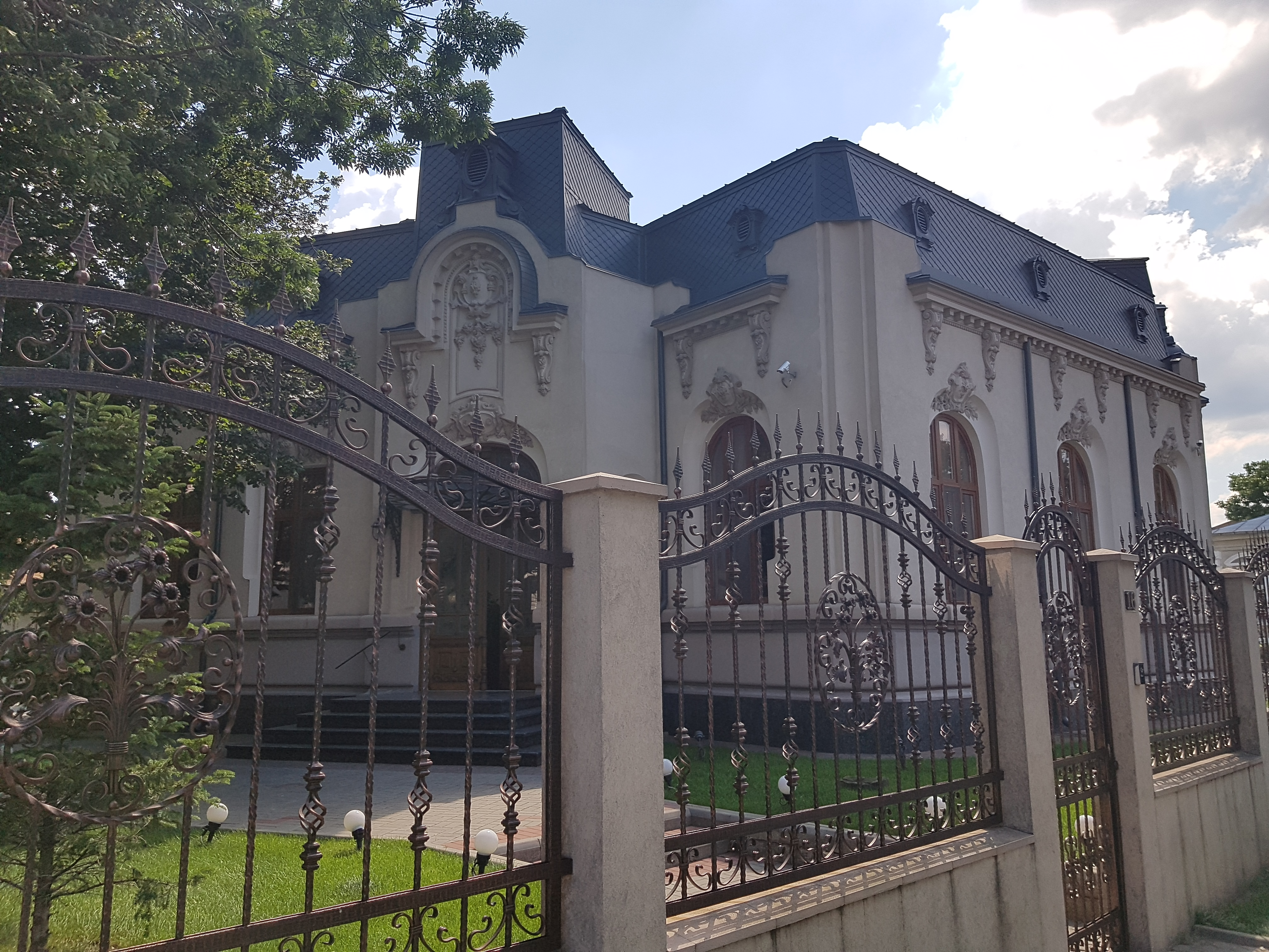 Monument istoric renovat